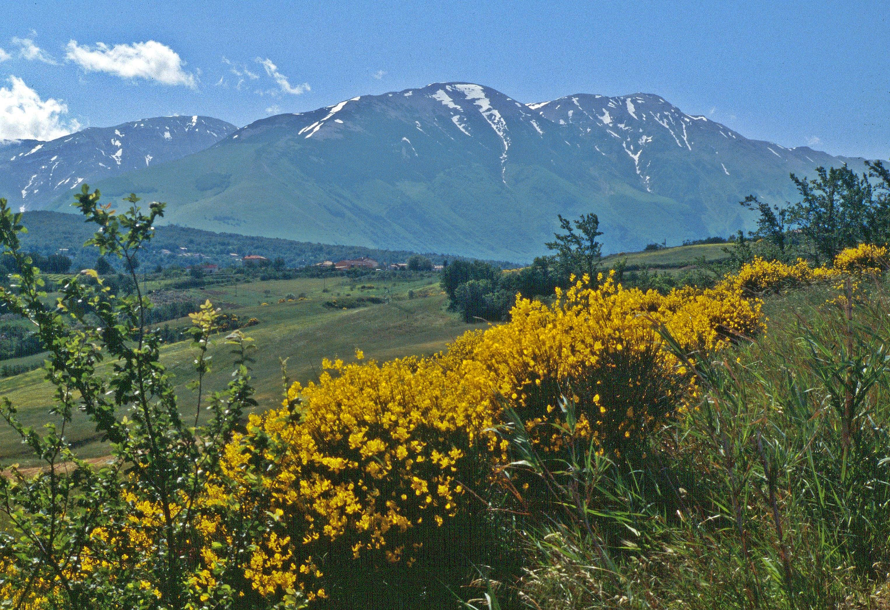 Majella-Naturpark